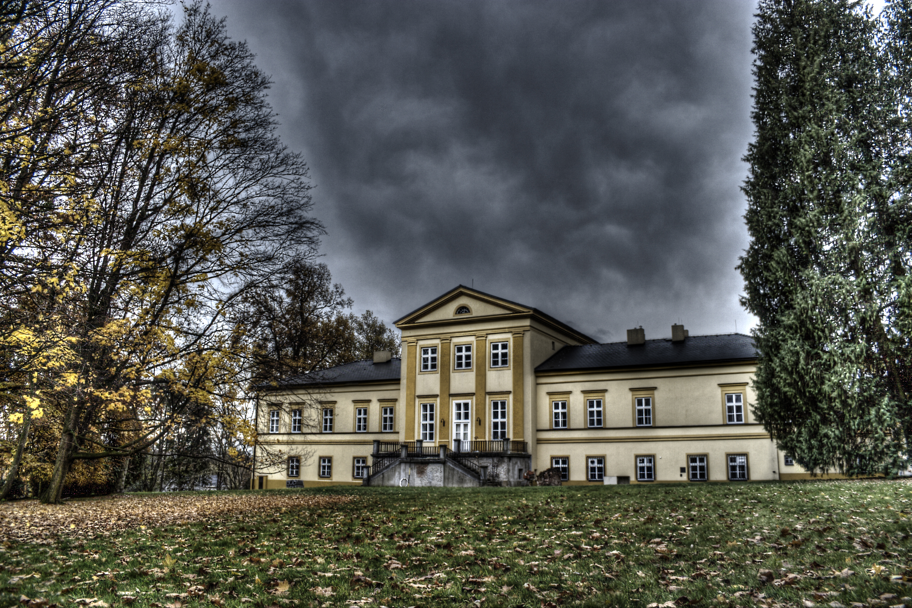 Zámek Štemplovec, Štemplovec 1